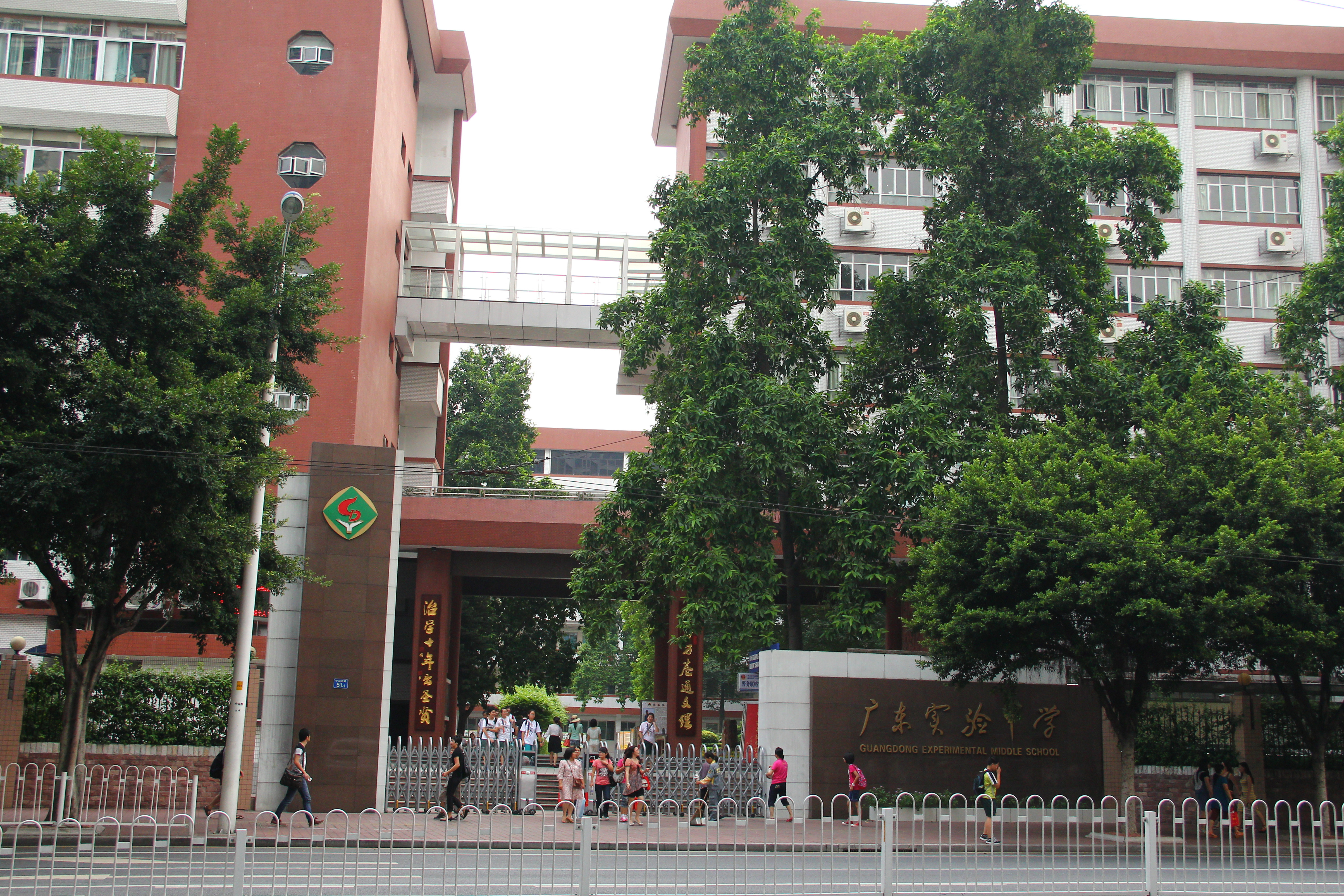 廣東實驗中學校門。